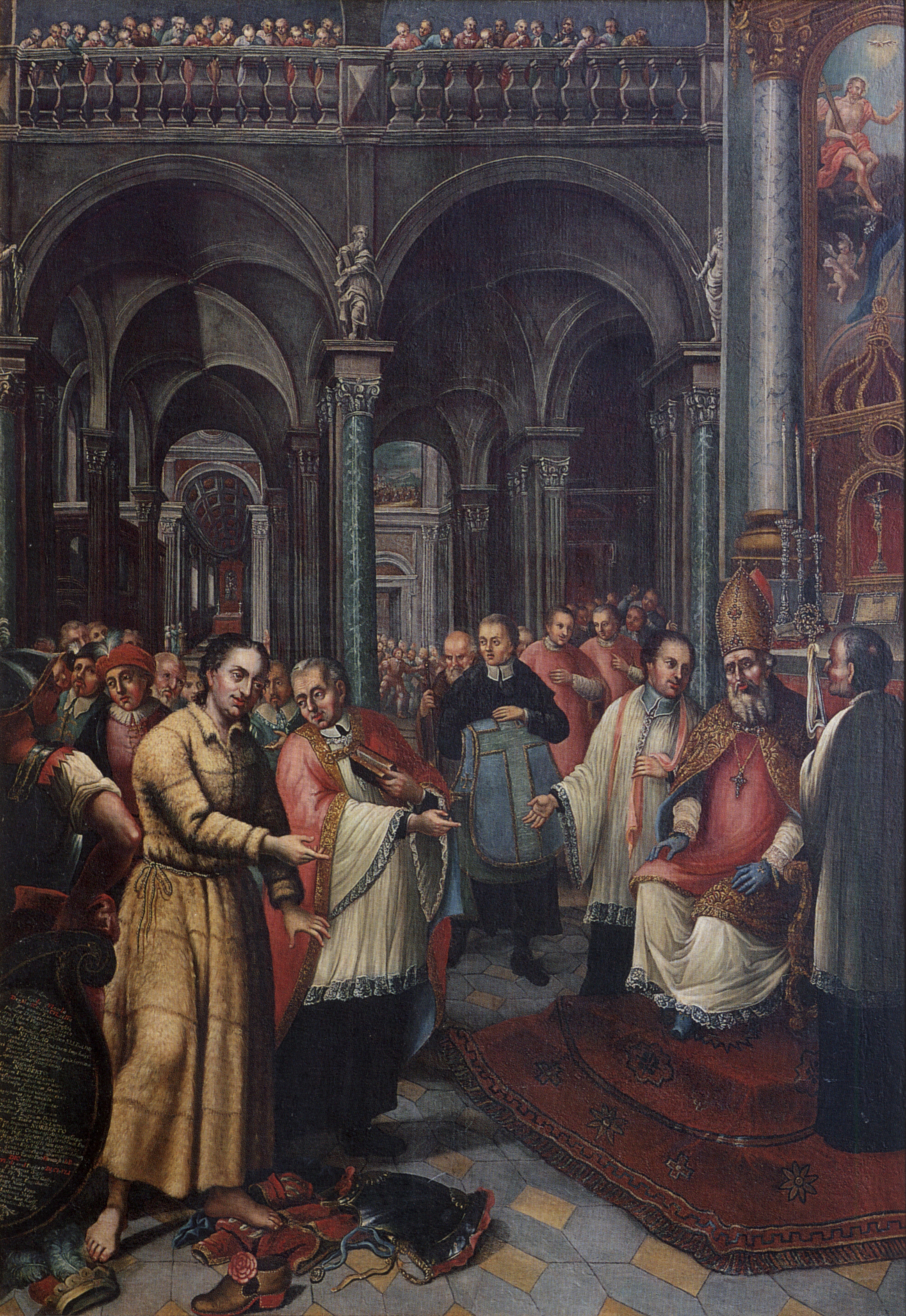 Norbert von Xanten empfängt am Karsamstag 1115 durch den Erzbischof von Köln die Diakons- und Priesterweihe; barockes Thesenbild von 1770, von Abt Nikolaus Kloos anlässlich eines theologischen Streitgesprächs in Auftrag gegeben; Klostermuseum Schussenried